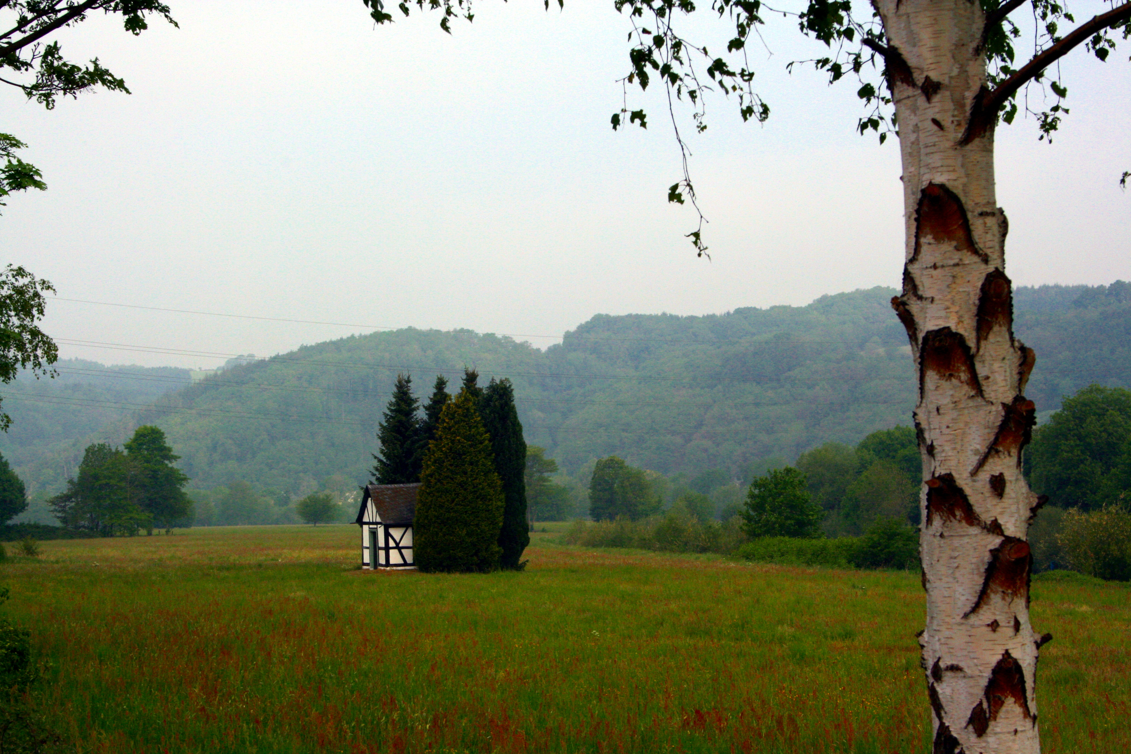 Heiligenhäuschen Heilige Apollonia, Alzenbach, Eitorf